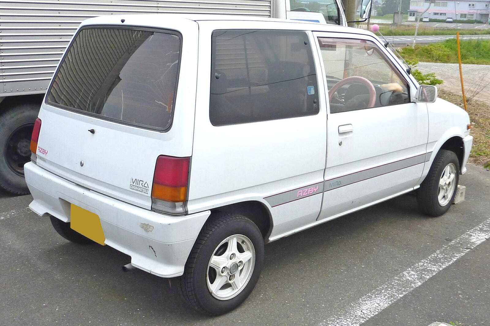 2代目ダイハツ・ミラ（リア）